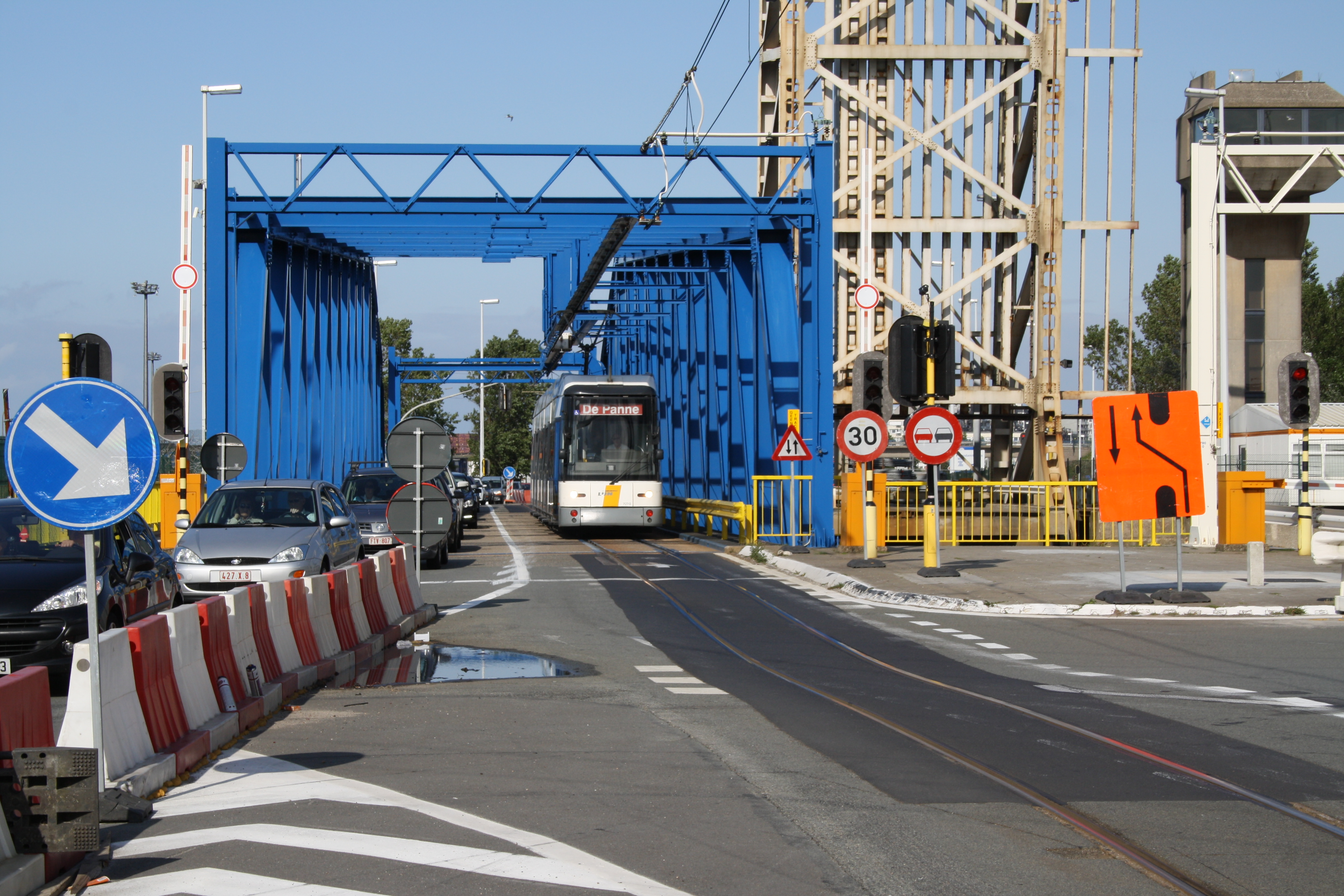 Behelfsbrücke Zeebrugge mit Niederflurtram